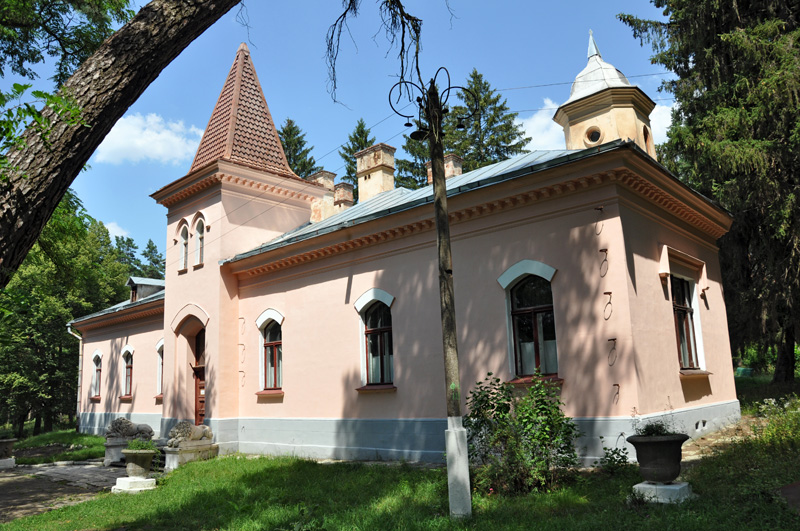 Замiська садиба Наталiївка (мур.)